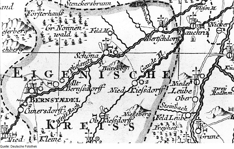 Original image description from the Deutsche Fotothek Schönau-Berzdorf auf dem Eigen-Schönau. Oberlausitzkarte, Schenk, 1759